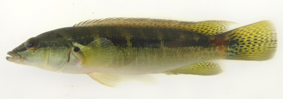 Ejemplar macho de C. minuano de Uruguay